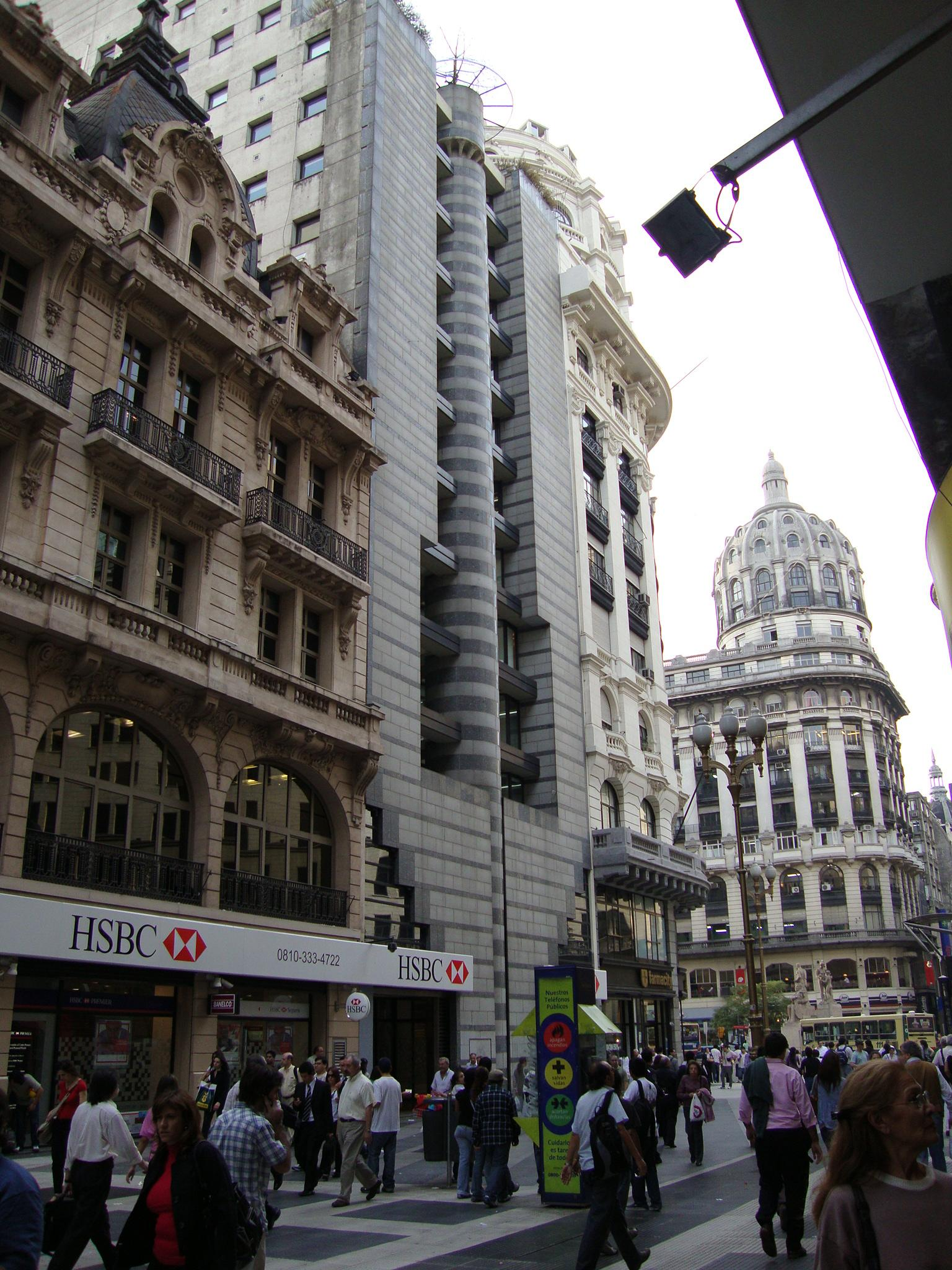 El Edificio de la sede central de la Banca Nazionale del Lavoro (hoy en manos de HSBC) en la calle Florida. A la derecha, la cúpula del Edificio Bencich. A la izquierda, la ex Casa Mappin & Webb. Buenos Aires, Argentina.